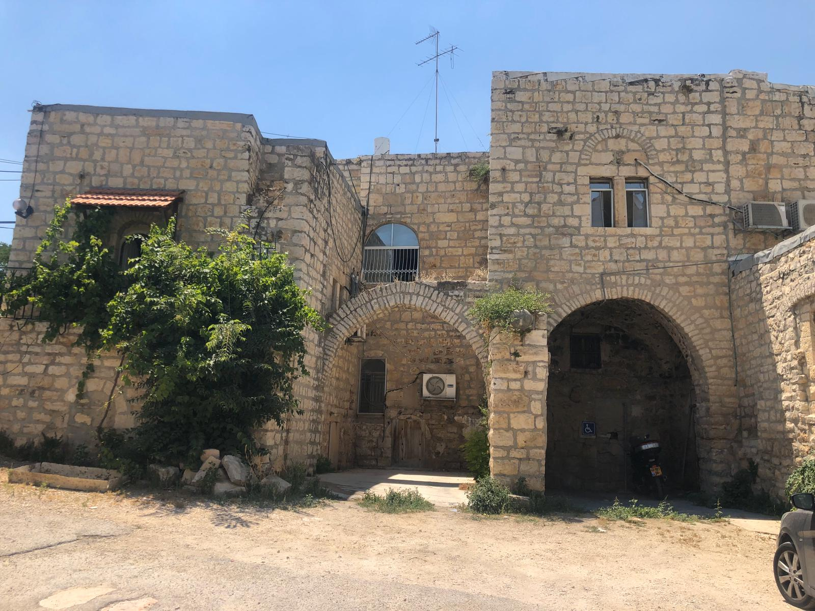 بيت من بيوت دير ياسين المهجرة في أسفل القرية